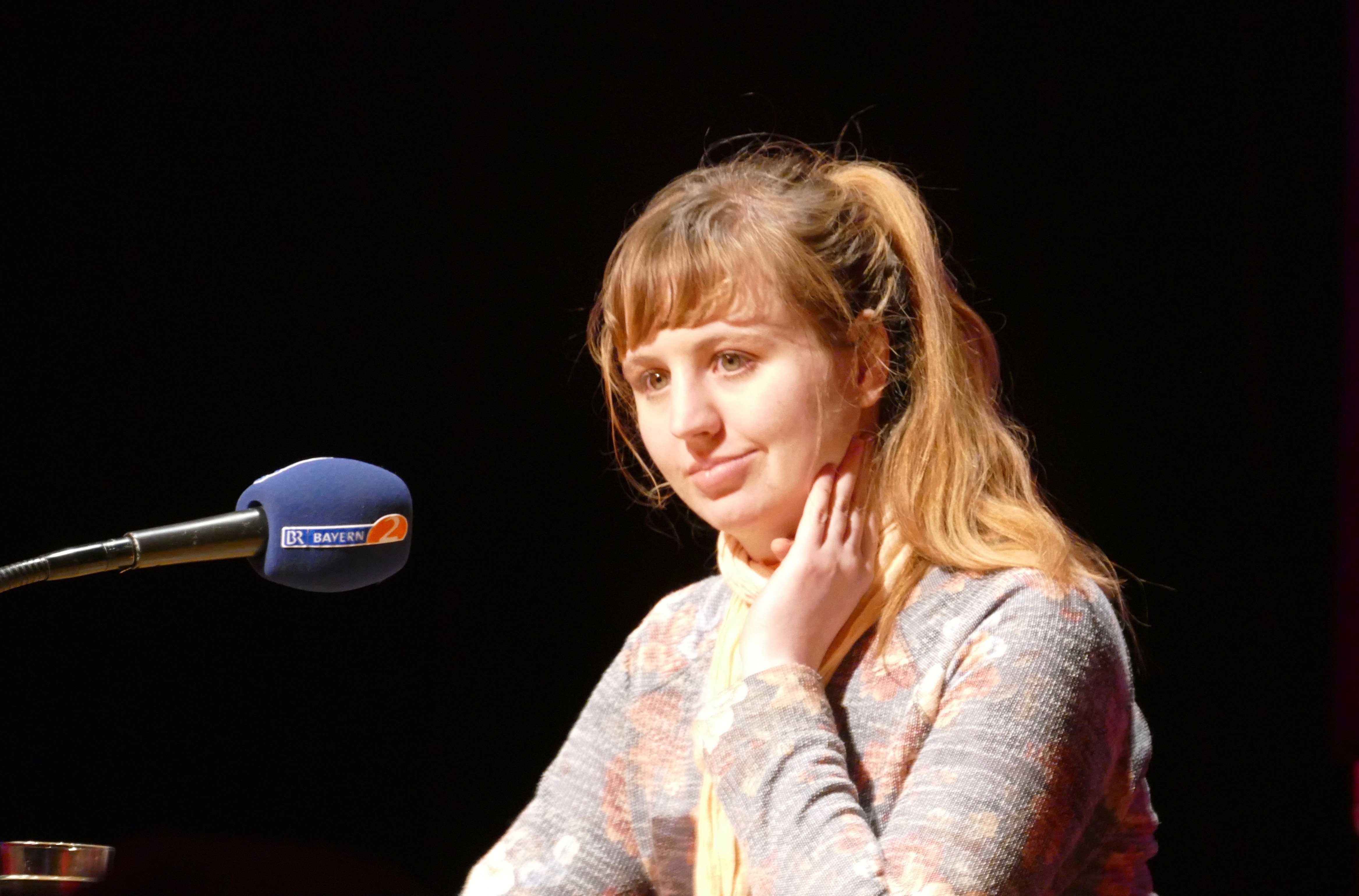 Irene Diwiak bei den Wortspielen 2018 in München